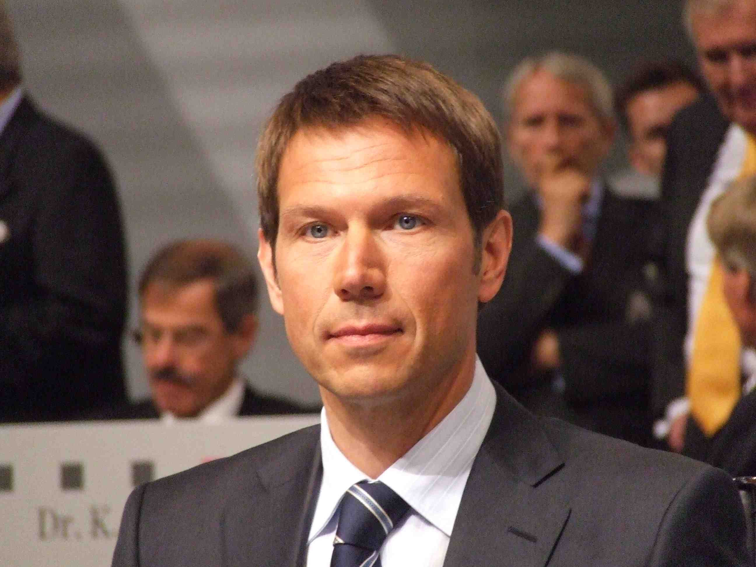 René Obermann Vorstandsvorsitzender der Deutschen Telekom AG auf der Hauptversammlung in der Kölnarena in Köln